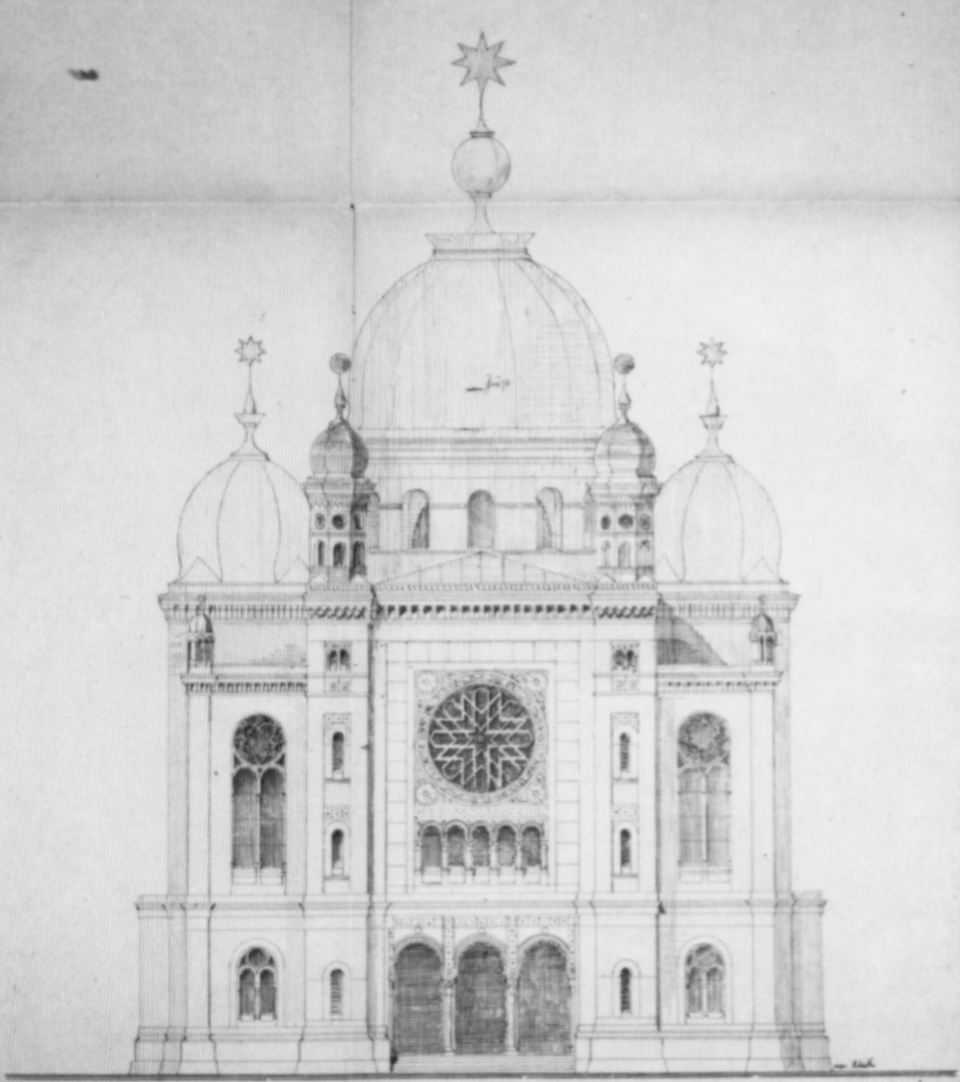 Ansicht der Hauptfront der Heilbronner Synagoge an der Allee aus den Bauakten